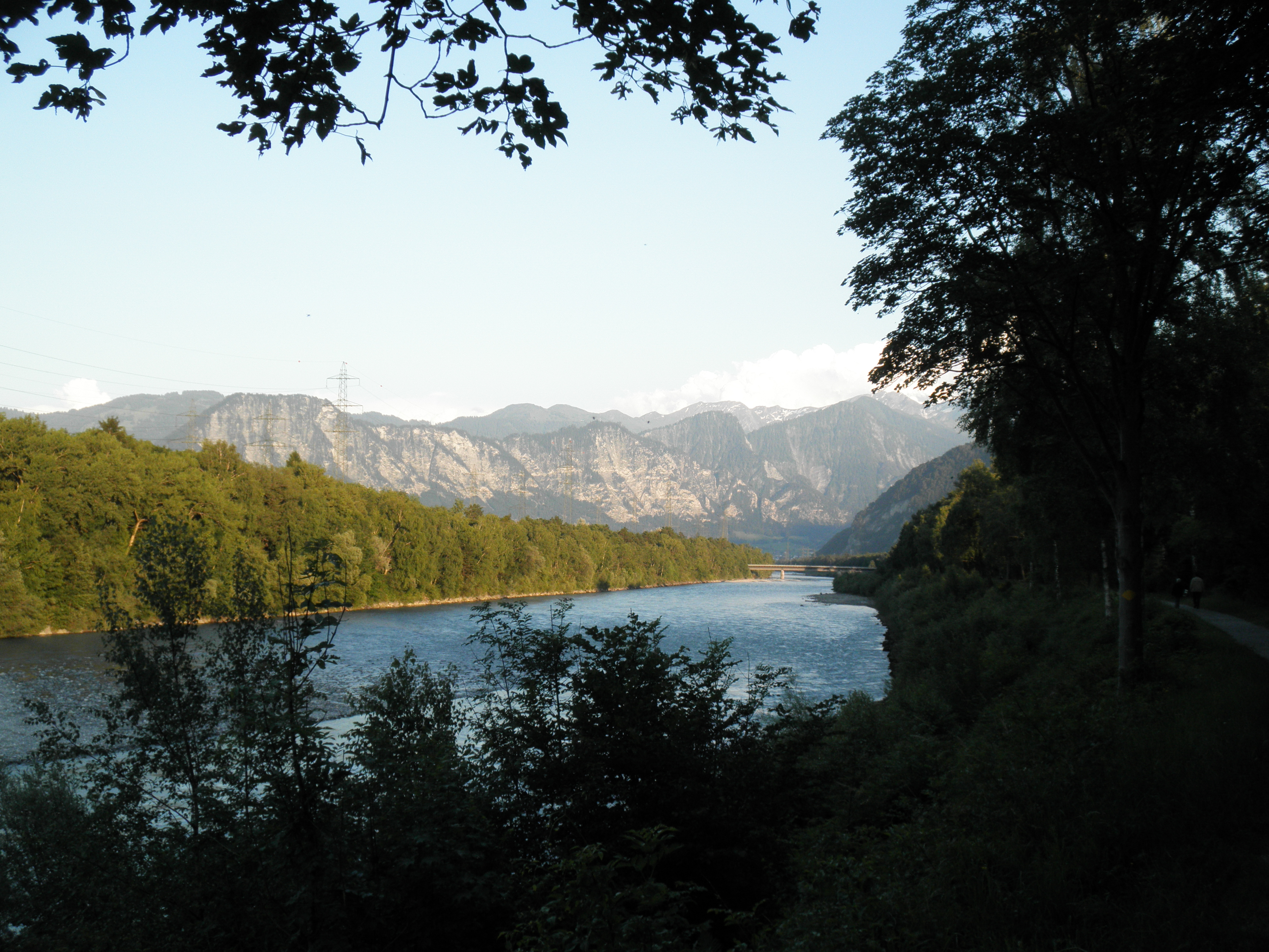 Alpenrhein zwischen Maienfeld und Bad Ragaz